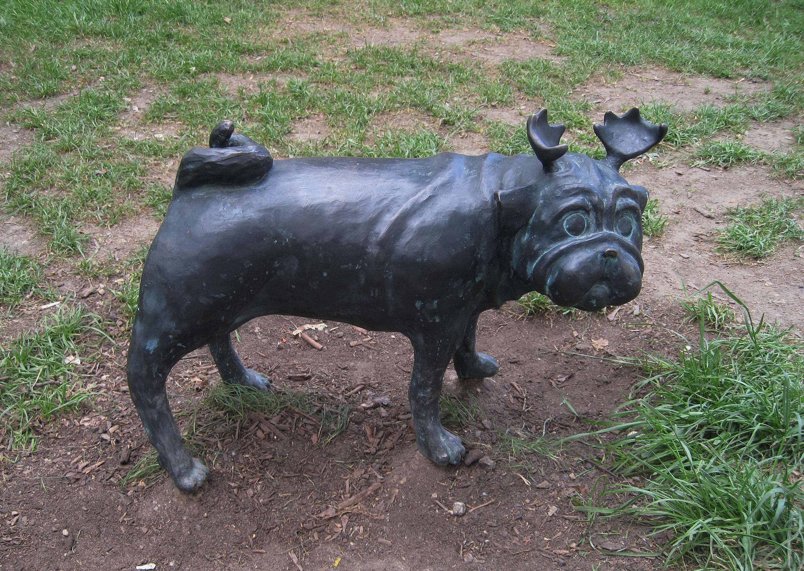 Waldmops (stehend) aus Bronze der Künstlerin Clara Walter, etwa 50 cm hoch. Standort: Humboldthain neben der Kirche St. Johannis (Waldmopszentrum) in Brandenburg an der Havel.